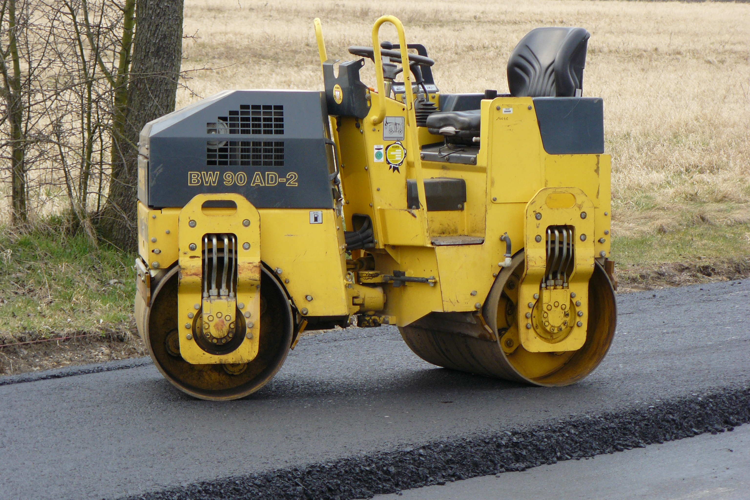 Bomag Tandem-Vibrationswalze BW 90 AD-2 mit hydrostatischer Pendel-Knicklenkung